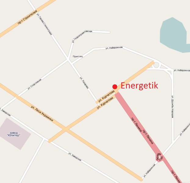 Umístění pálace kultury Energetik mapě Pripjatě